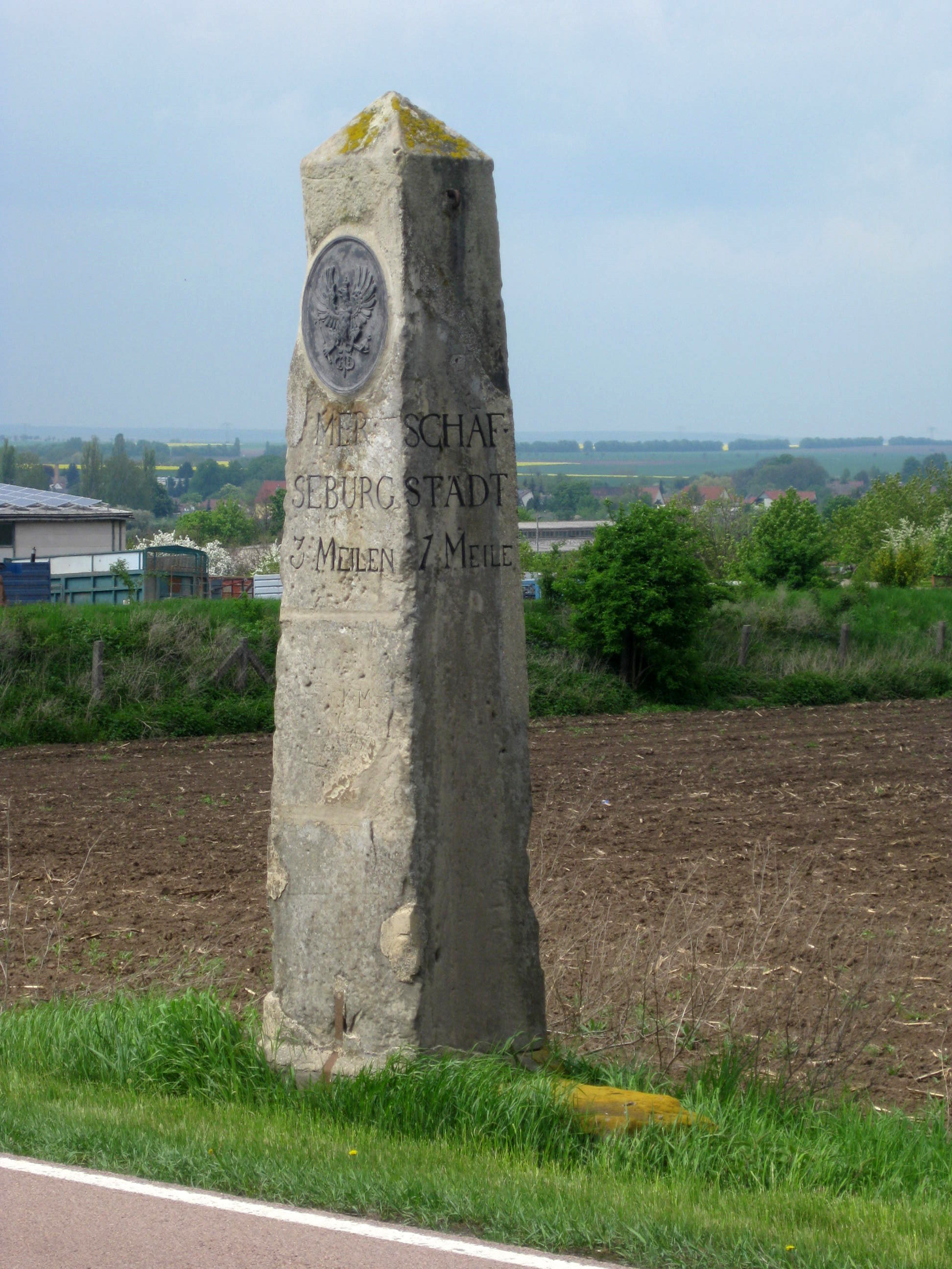 Preußischer Ganzmeilenobelisk an der L172 bei Obhausen (Altweidenbach)